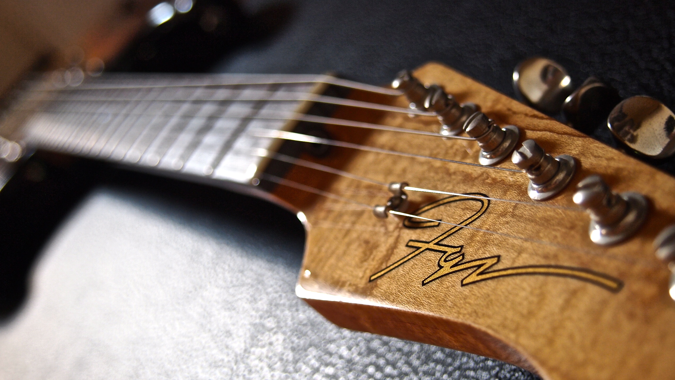 FujiGen Stratocaster semiorder (by kohrogi34)